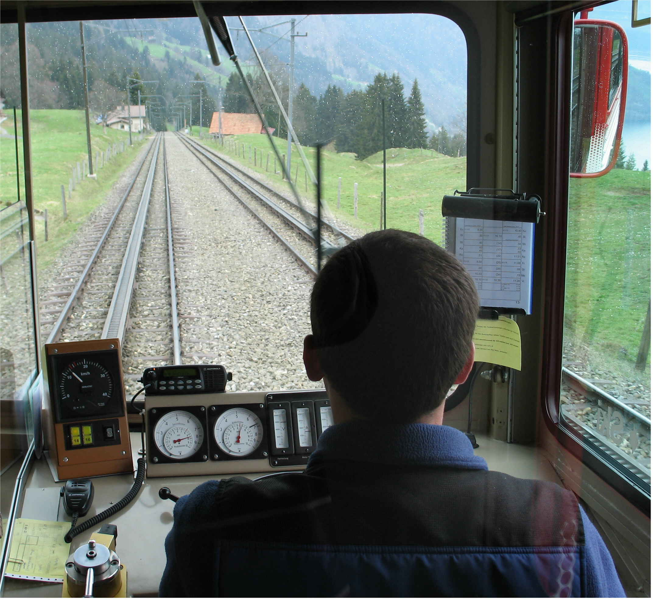 An der Rigibunn.